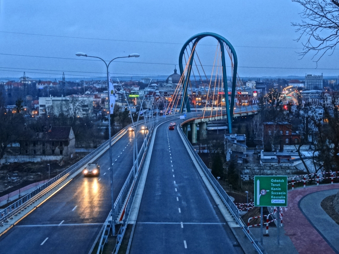 Trasa Uniwersytecka z pylonem nocą